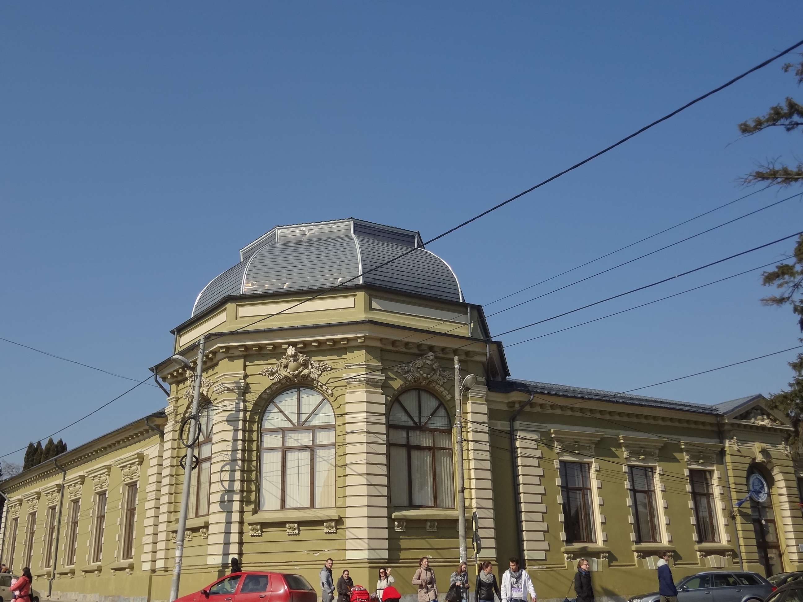 Falticeni musee du monde aquatique 1